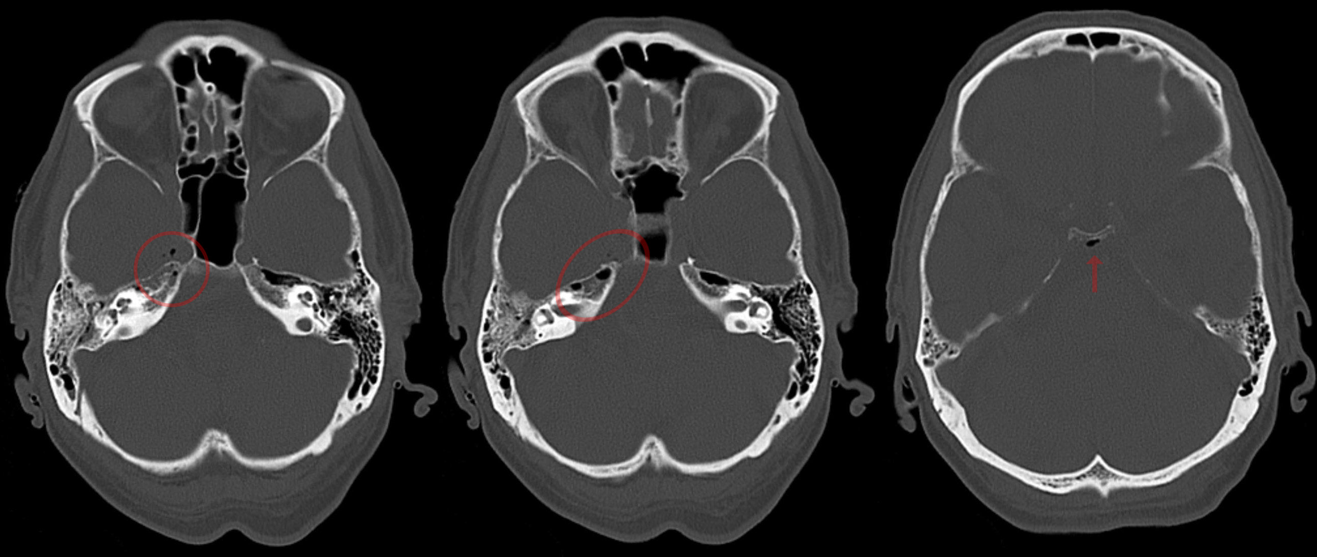 Entzündung der Felsenbeinspitze rechts mit Permeation nach intrakraniell und Gasnachweis hier. CT im Knochenfenster axial.